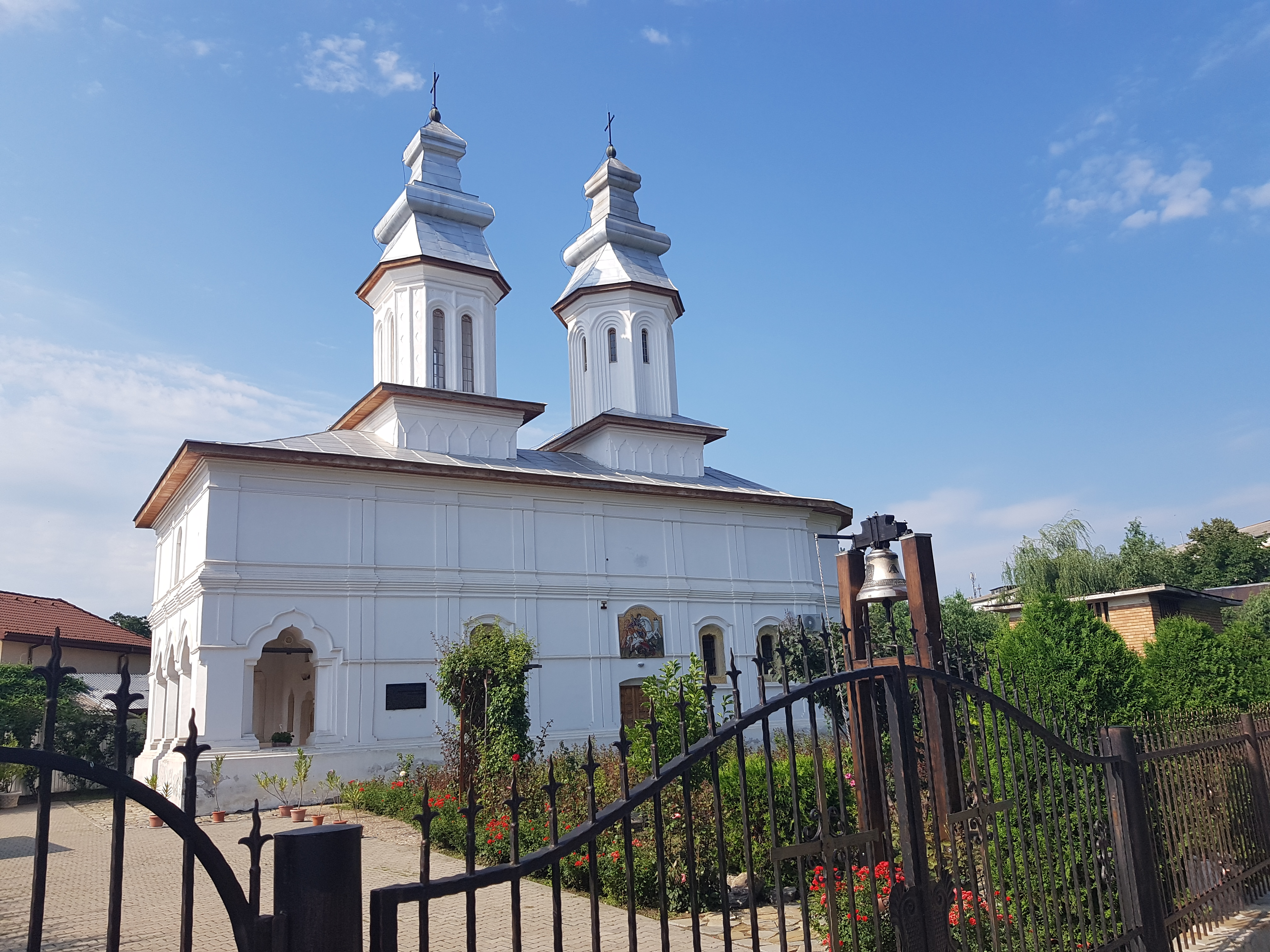 Biserica armenească „Sf. Gheorghe”